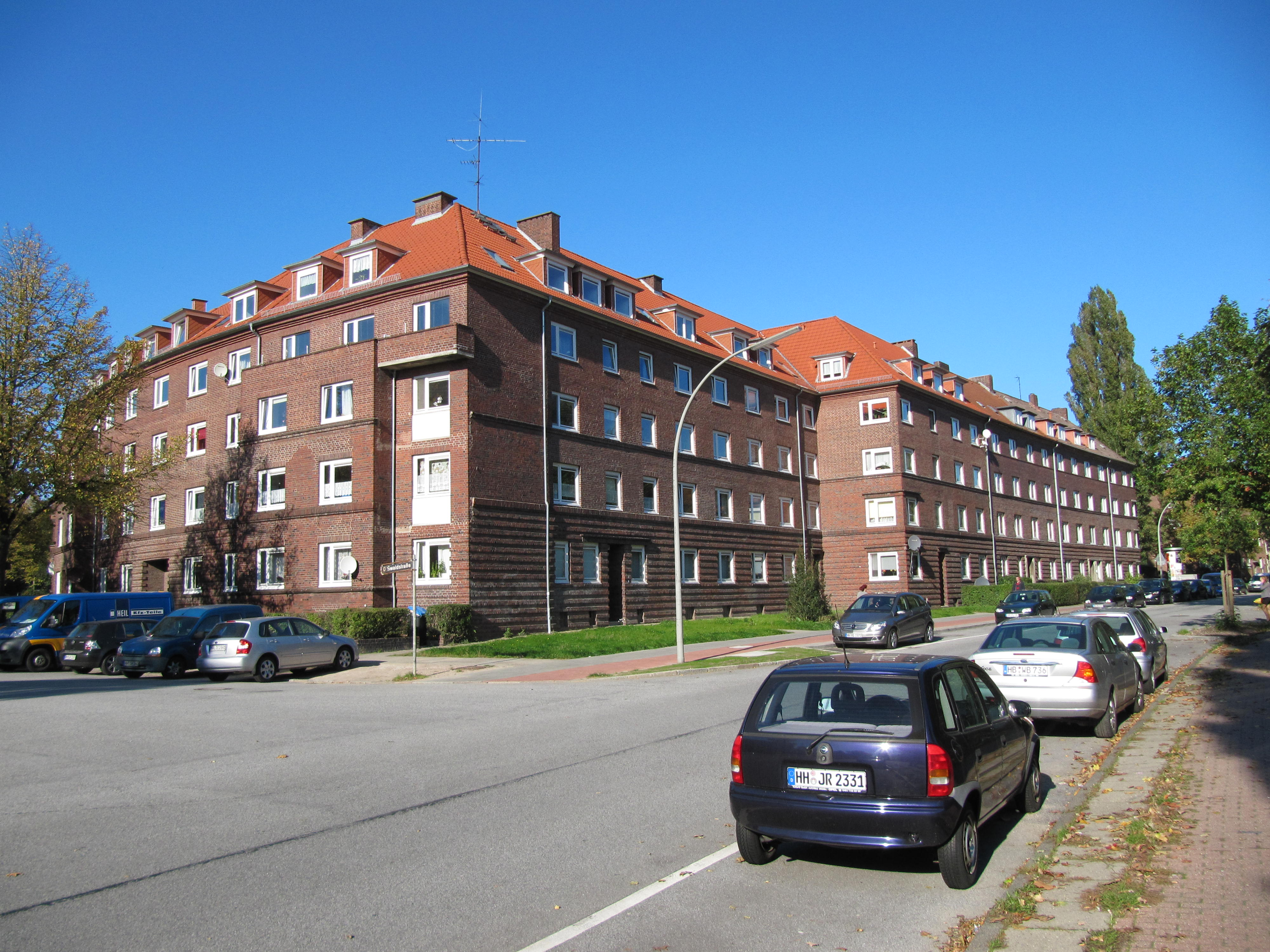 Typische Backstein-Bebauung in Hamburg-Horn